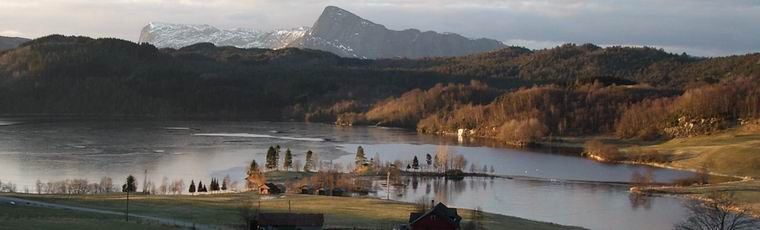 Aksevatnet, Hyllestad, Sogn og Fjordane, Norway. Photo by Roger Birkeland (user:rogerb)